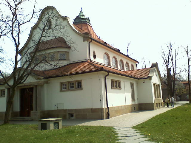 Zespół szpitalno-parkowy, Kraków, ul. Babińskiego 29